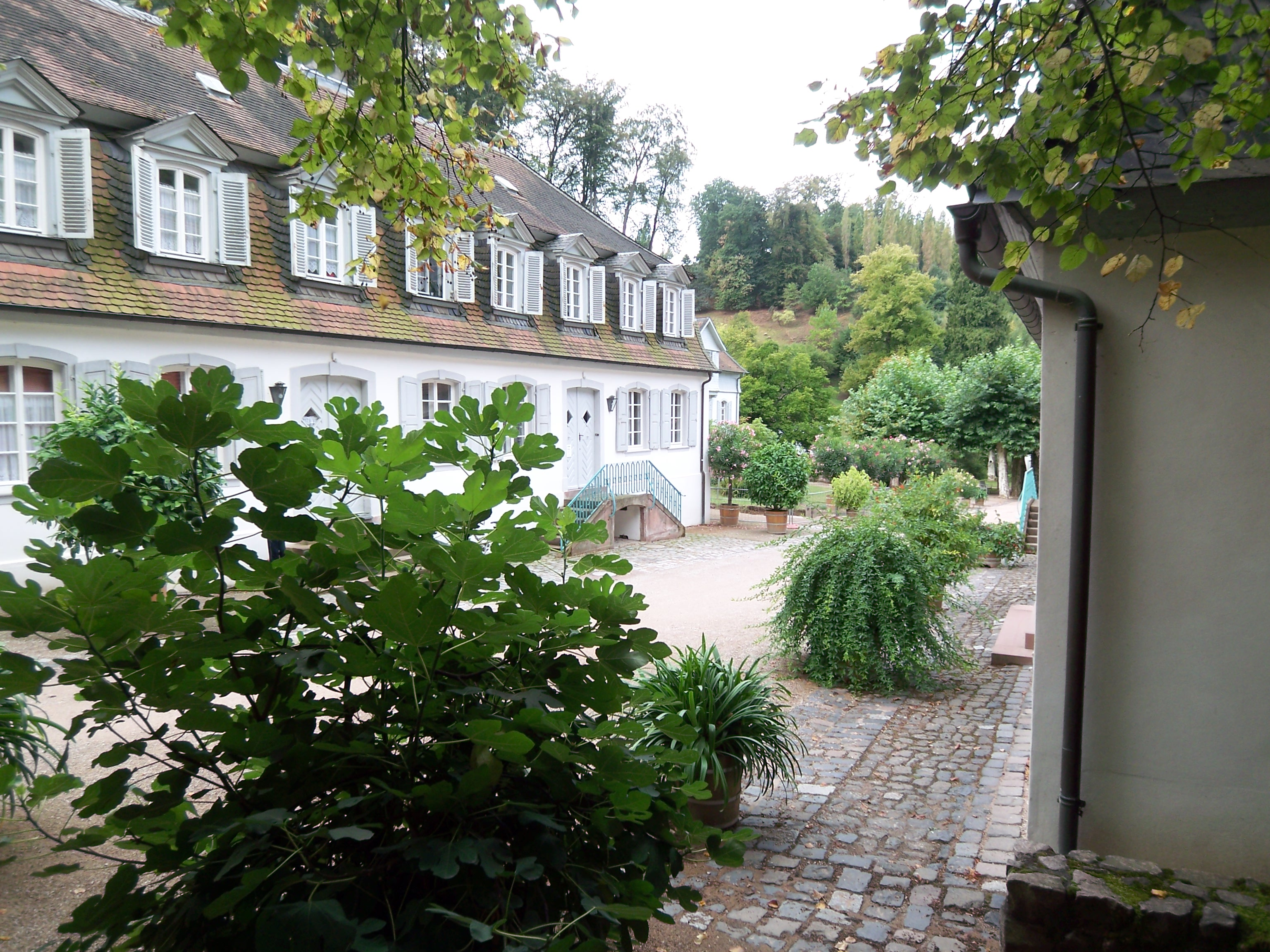 Die "Dorfstraße" der ehemaligen großherzoglichen Sommerresidenz, dem Fürstenlager in Bensheim-Auerbach